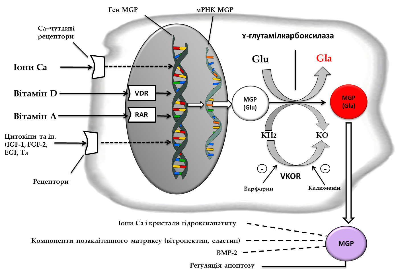 Схема, що ілюструє процеси, пов’язані з утворенням і функціонуванням MGP. VDR – vitamin D receptor; RAR – retinoic acid receptor; VKOR – vitamon K epoxide reductase; KH2, KO – відповідно відновлена і окиснена форми вітаміну K; BMP-2 – bone morphogenetic protein